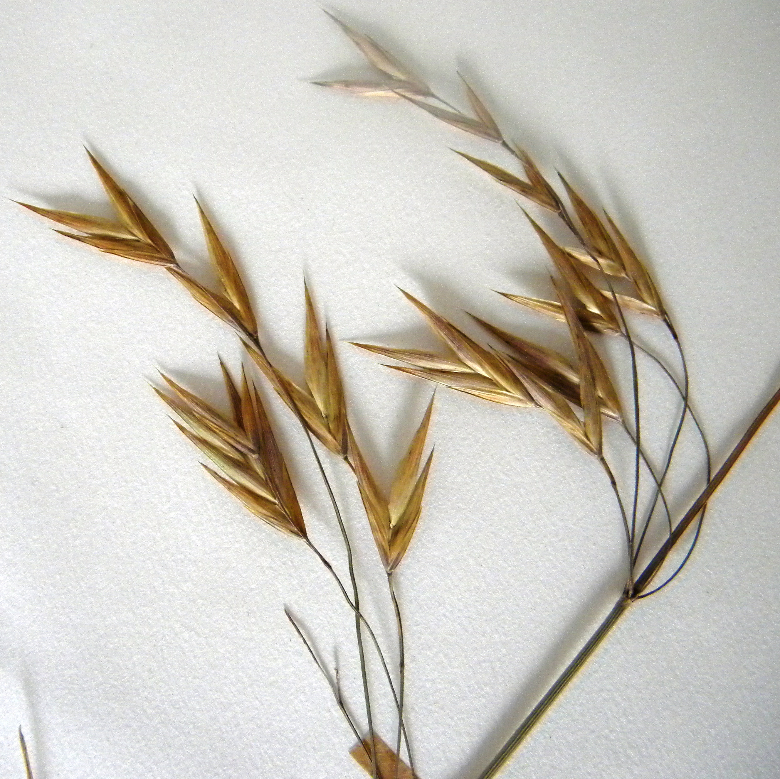 Bromus catharticus (Chisey)